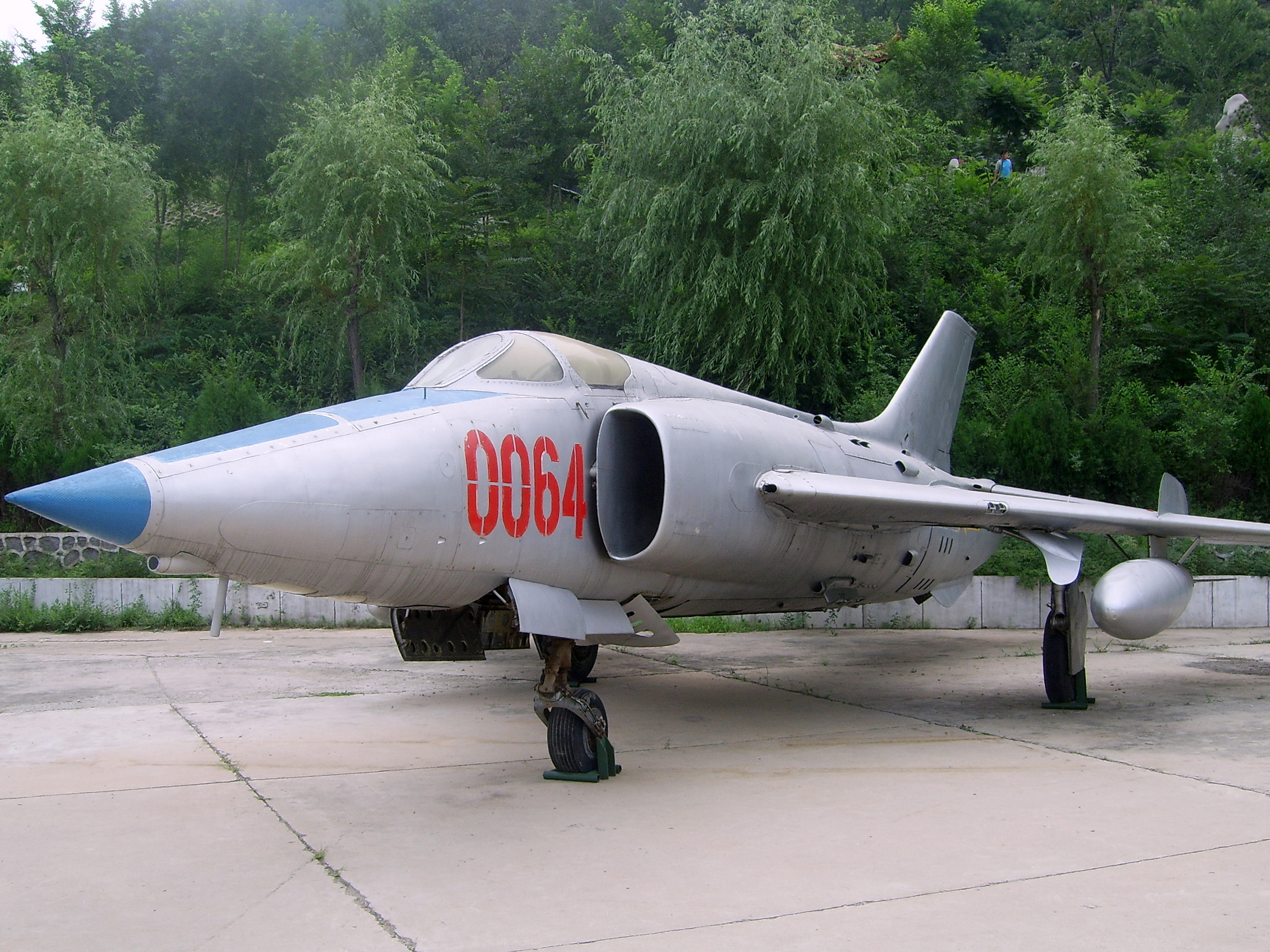 强-5飞机，于中国航空博物馆